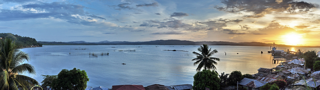 Hondagua, Lopez, Quezon, Philippines